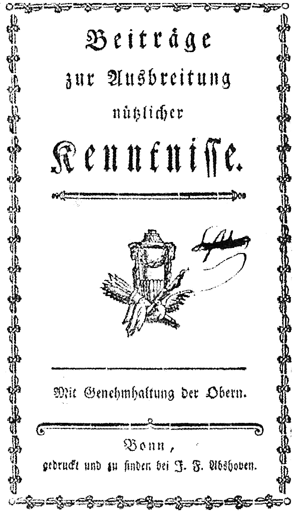 Titelblatt der Bonner Illuminatenzeitschrift "Beiträge zur Ausbreitung nützlicher Kenntnisse"